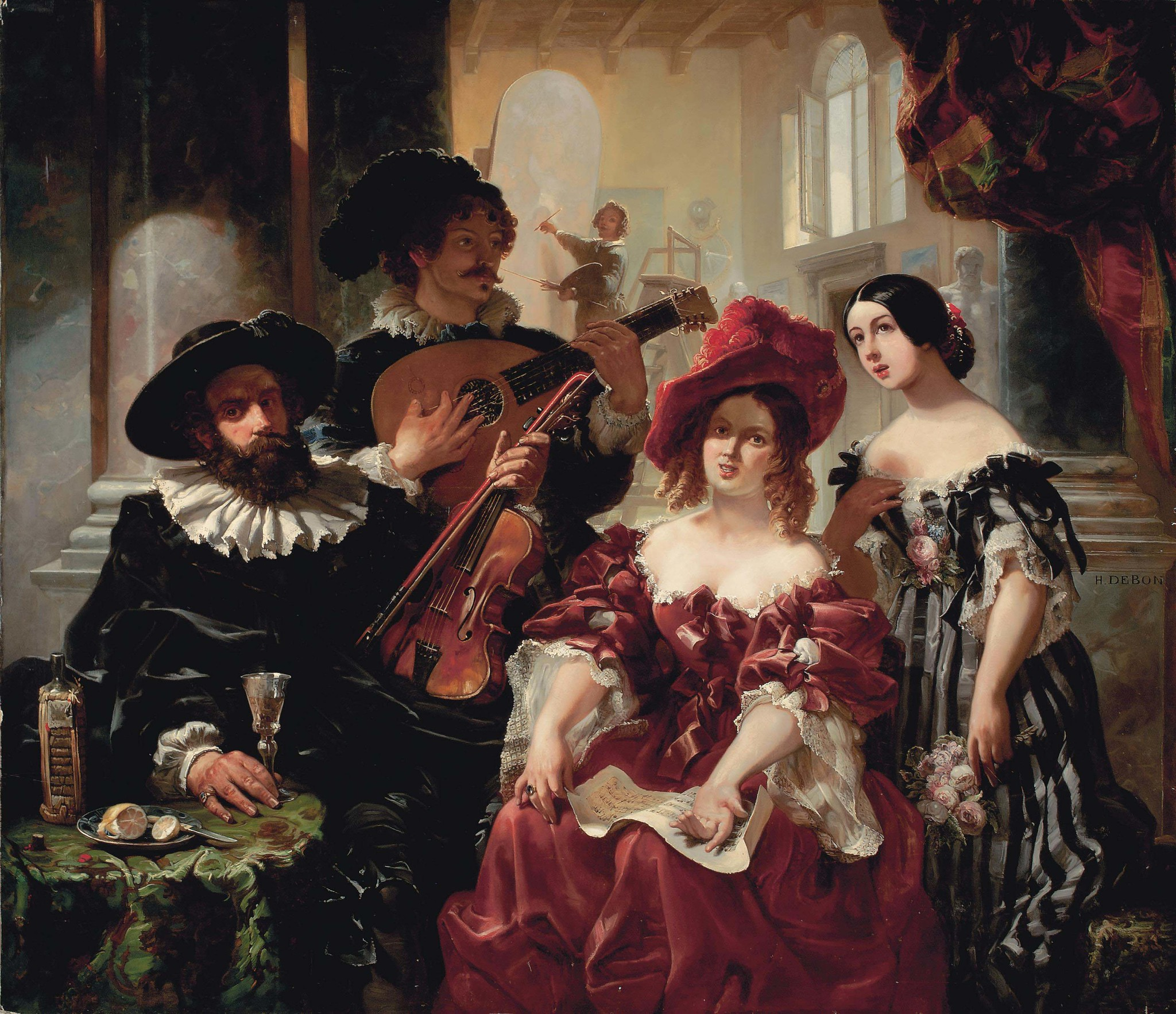 Un récital dans l’atelier de l’artiste